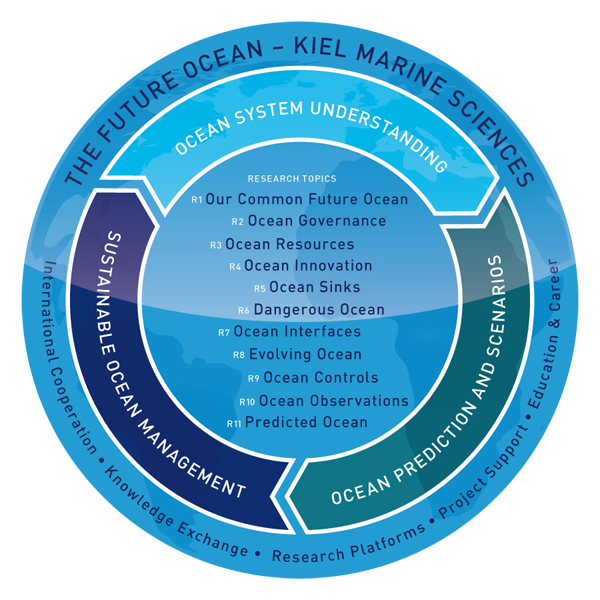 Organigramm der zweiten Phase des Exzellenzclusters Ozean der Zukunft